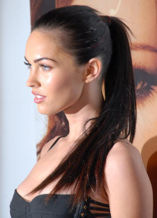 Megan Fox.